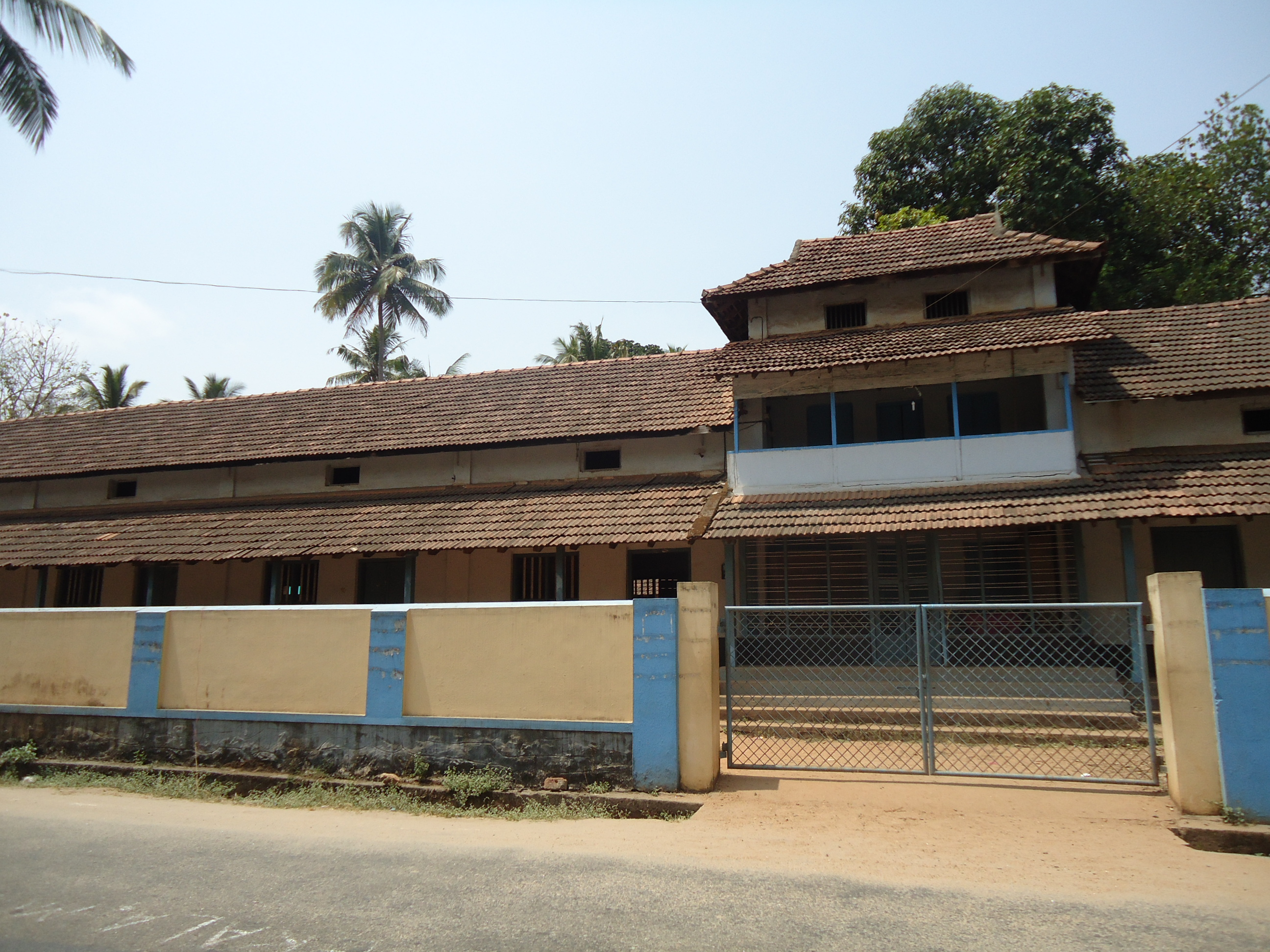 SNDP High School Neeleeswaram